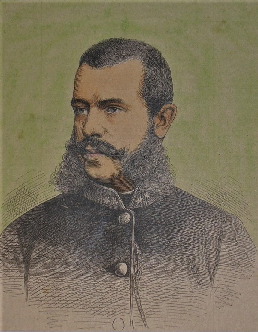 Erzherzog Johann Salvator von Österreich, 1878, teilkolorierter Holzstich, ca. 14 x 12 cm